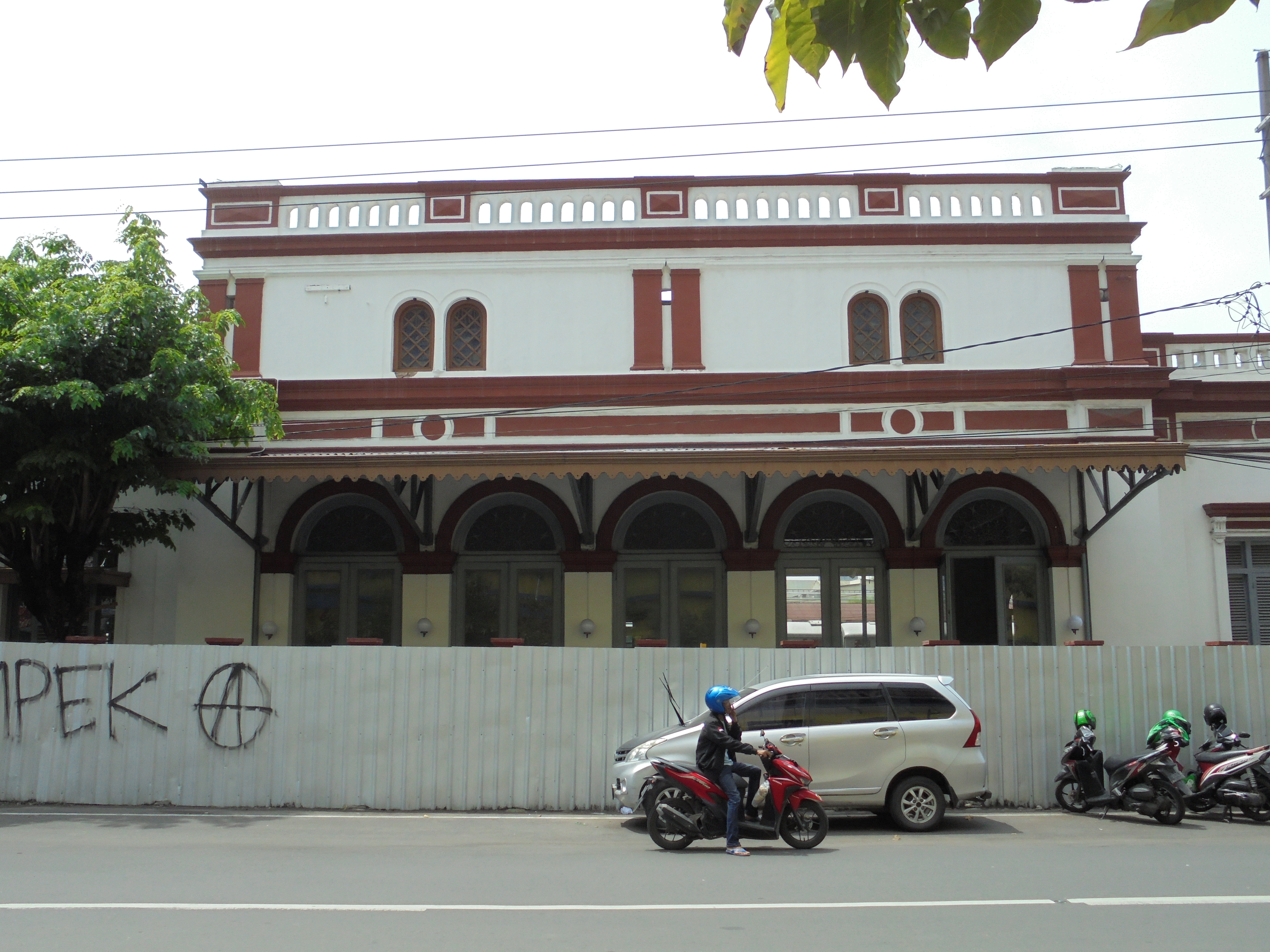 Tampak depan Stasiun Surabaya Kota bangunan lama tahun 2020. Bangunan ini lama tidak terpakai sehingga aktivitas stasiun berada di Plaza Indo - di barat bangunan ini